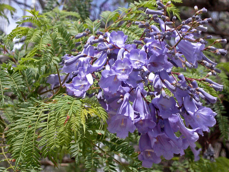 Fleurs de Jaracandas